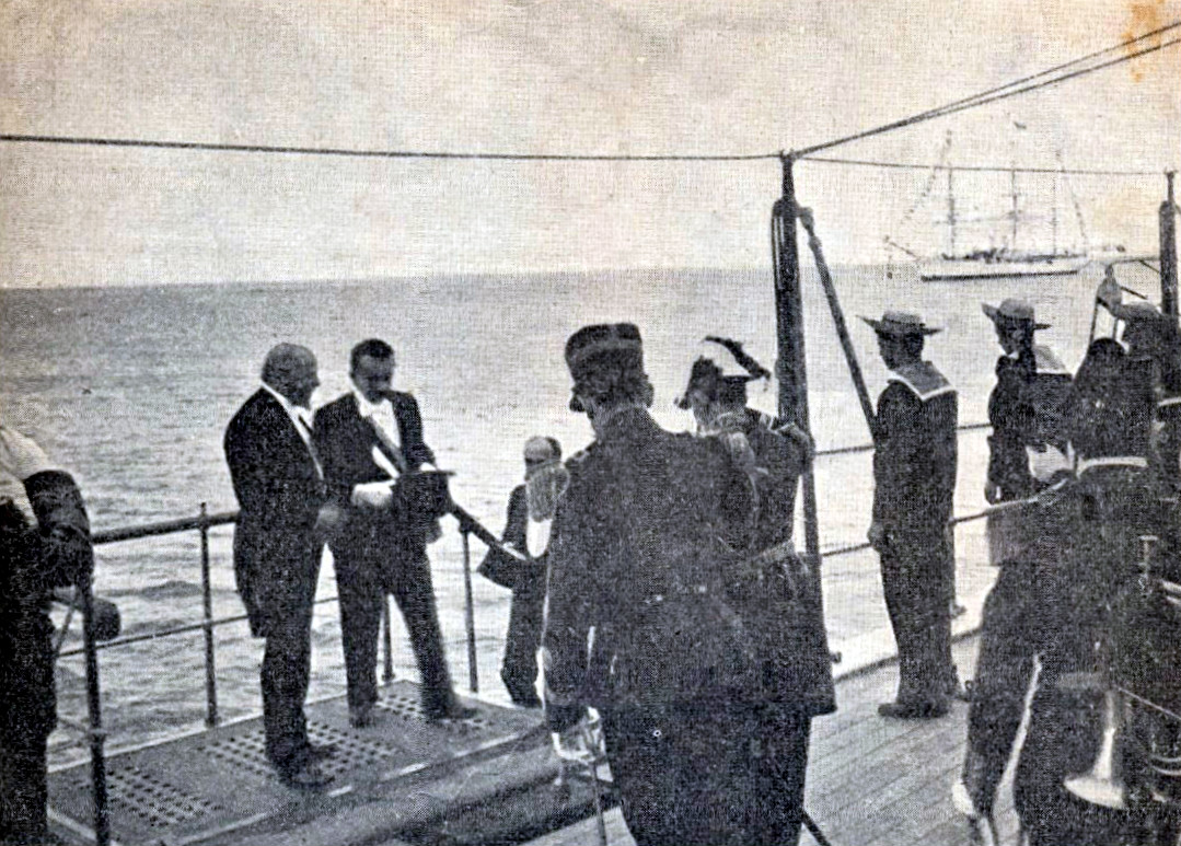 "La entrevista de los presidentes de Chile y Argentina, a bordo del 'Belgrano'". Al momento de llegar el presidente chileno Federico Errázuriz al buque almirante y cambiar su primer saludo con el general argentino Julio A. Roca, 25 de febrero de 1899